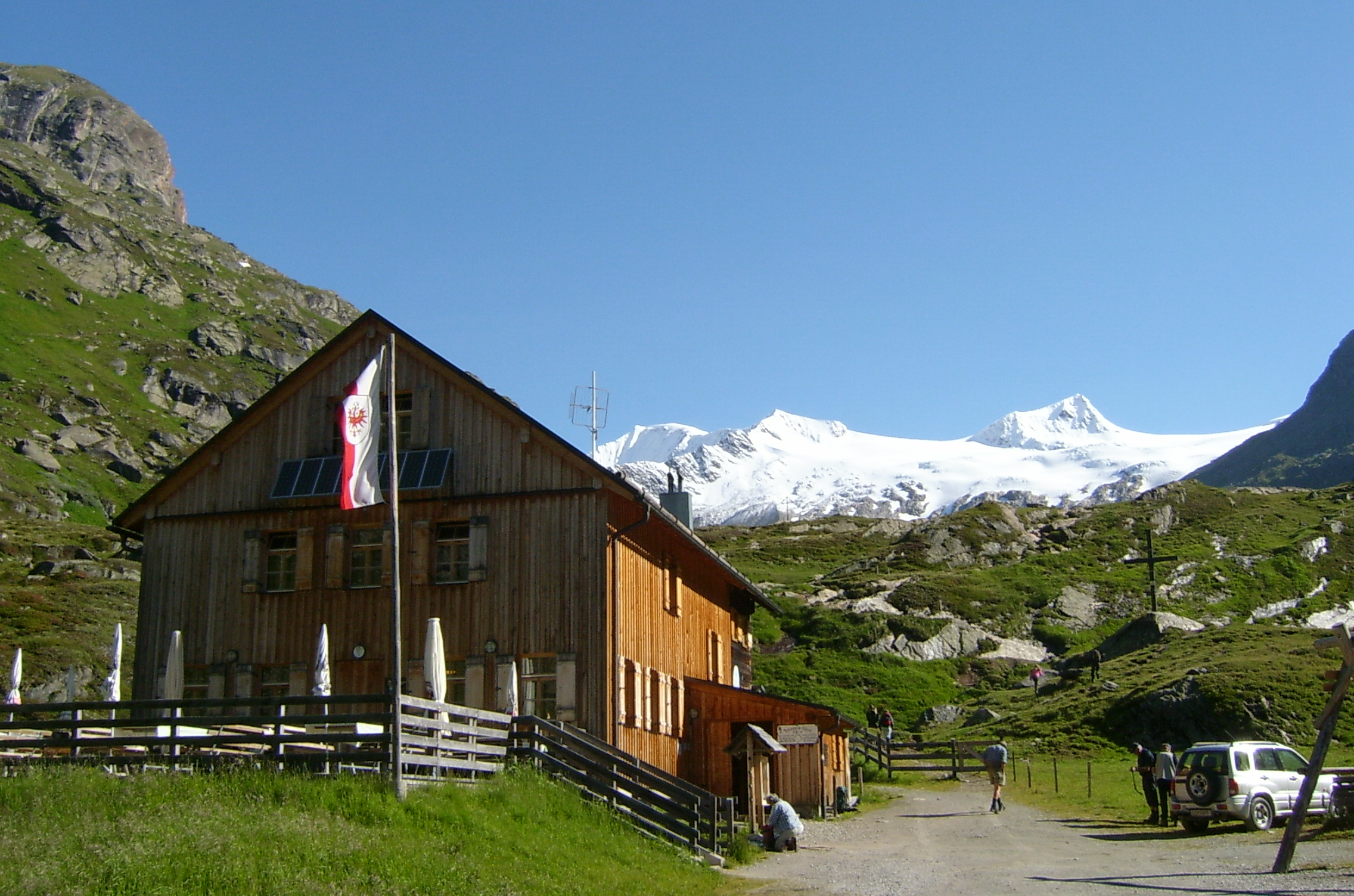 Johannishütte mit Großvenediger im Hintergrund. Aufnahme von Mittwoch den 13.07.2005 Fotografiert von: --j11